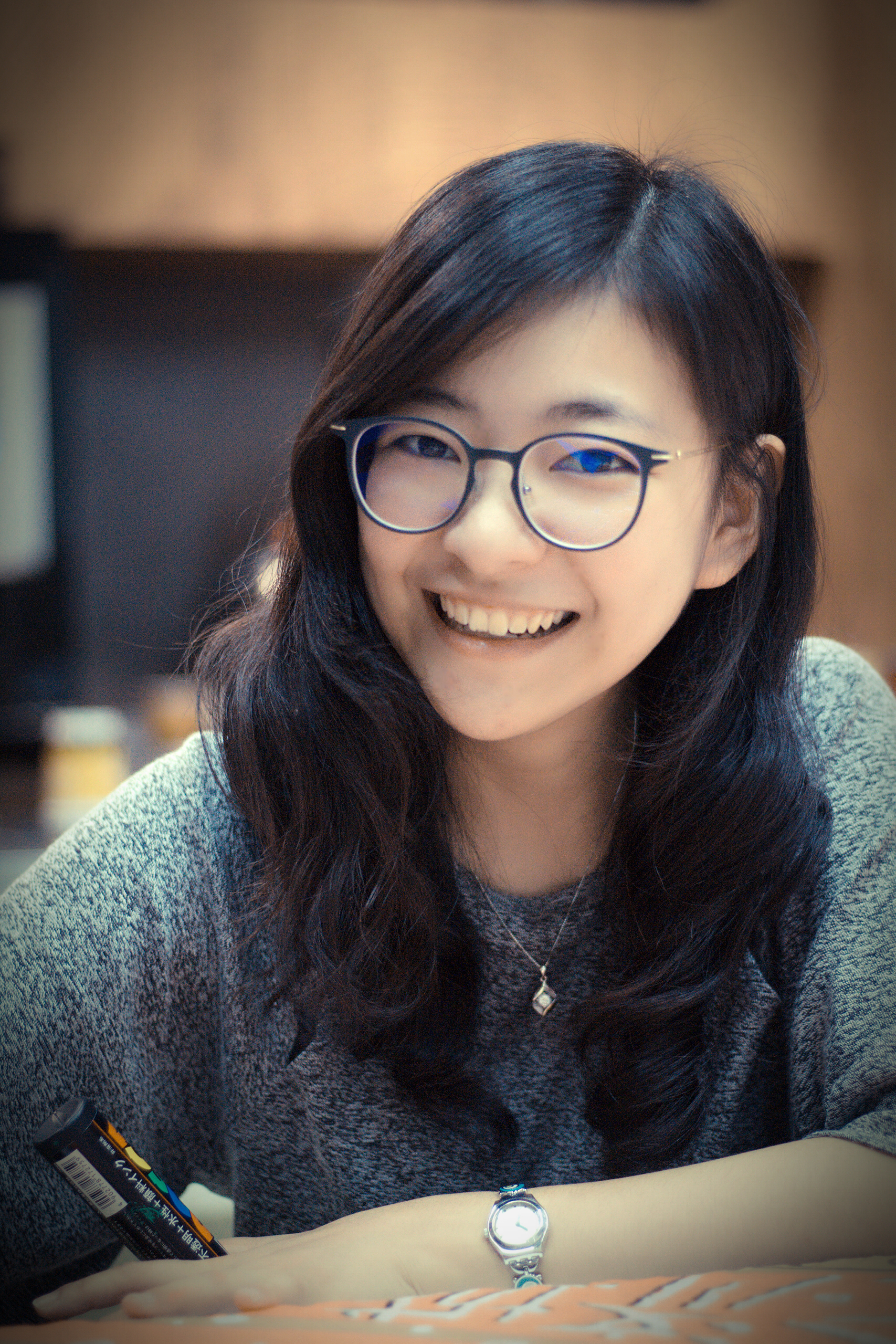 中文（台灣）: 魯美辰照片